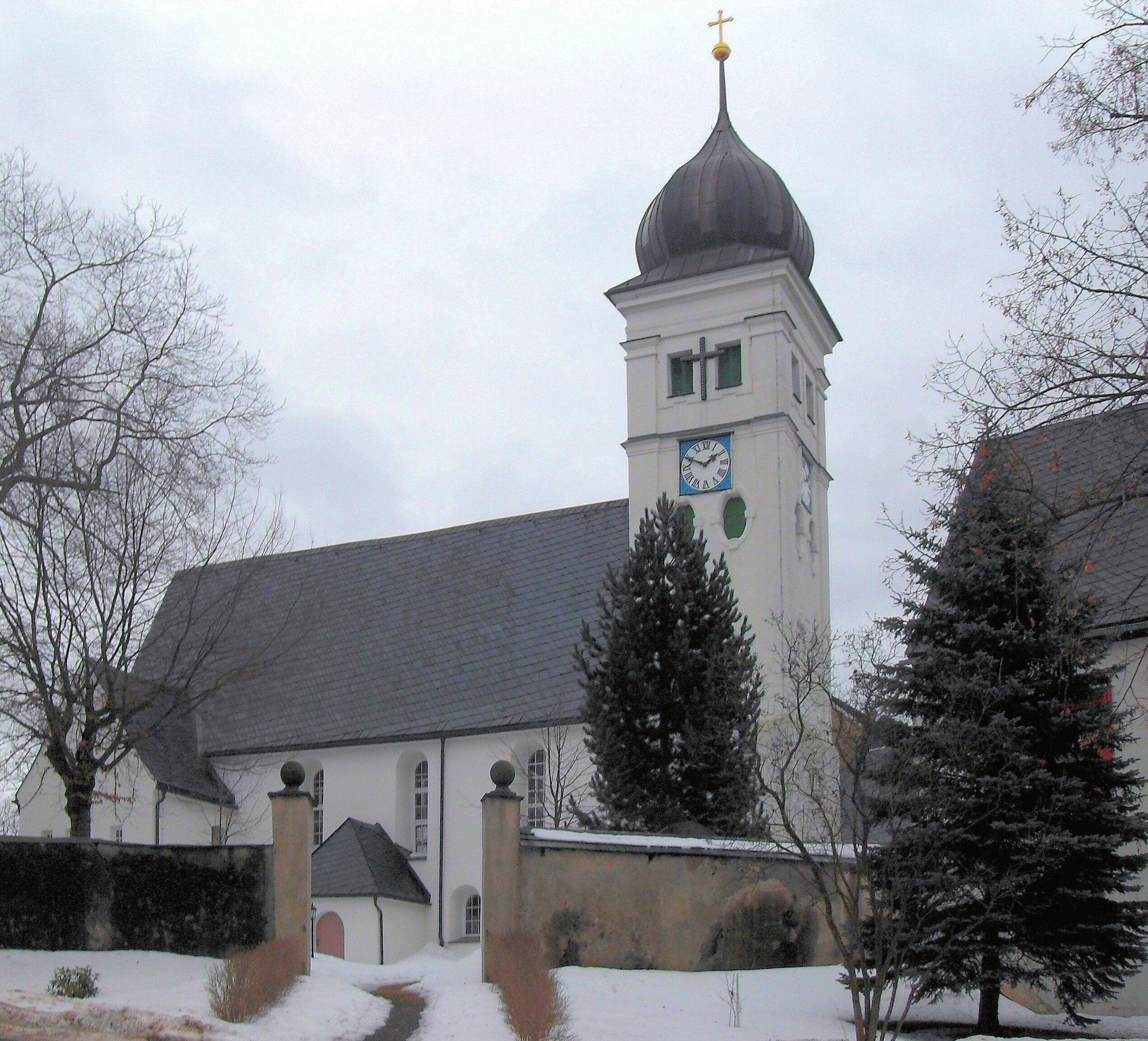 Kirche St. Georg in Pfaffroda, Erzgebirgskreis, Deutschland